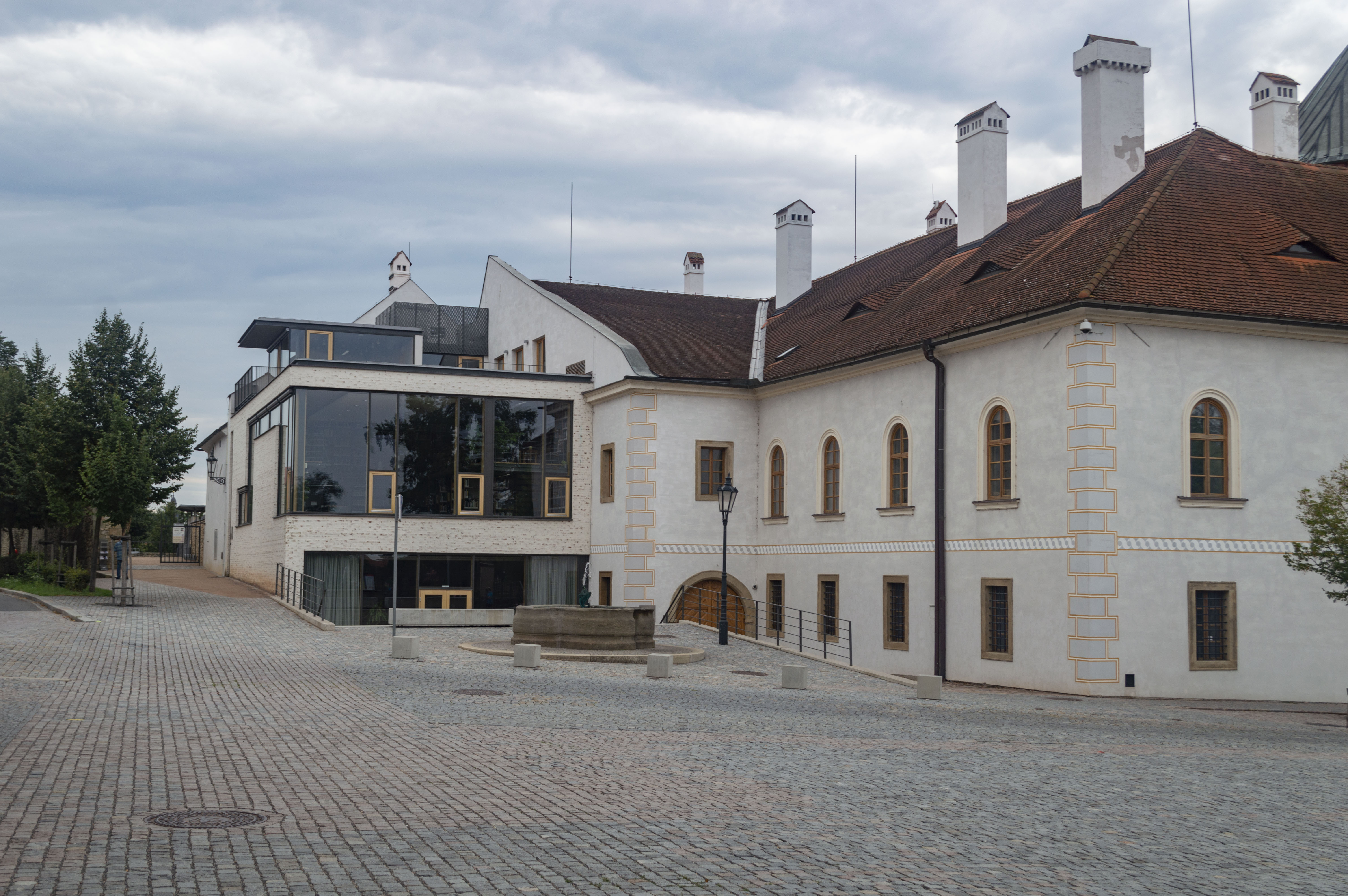 Piaristická kolej v Litomyšli a moderní přístavba